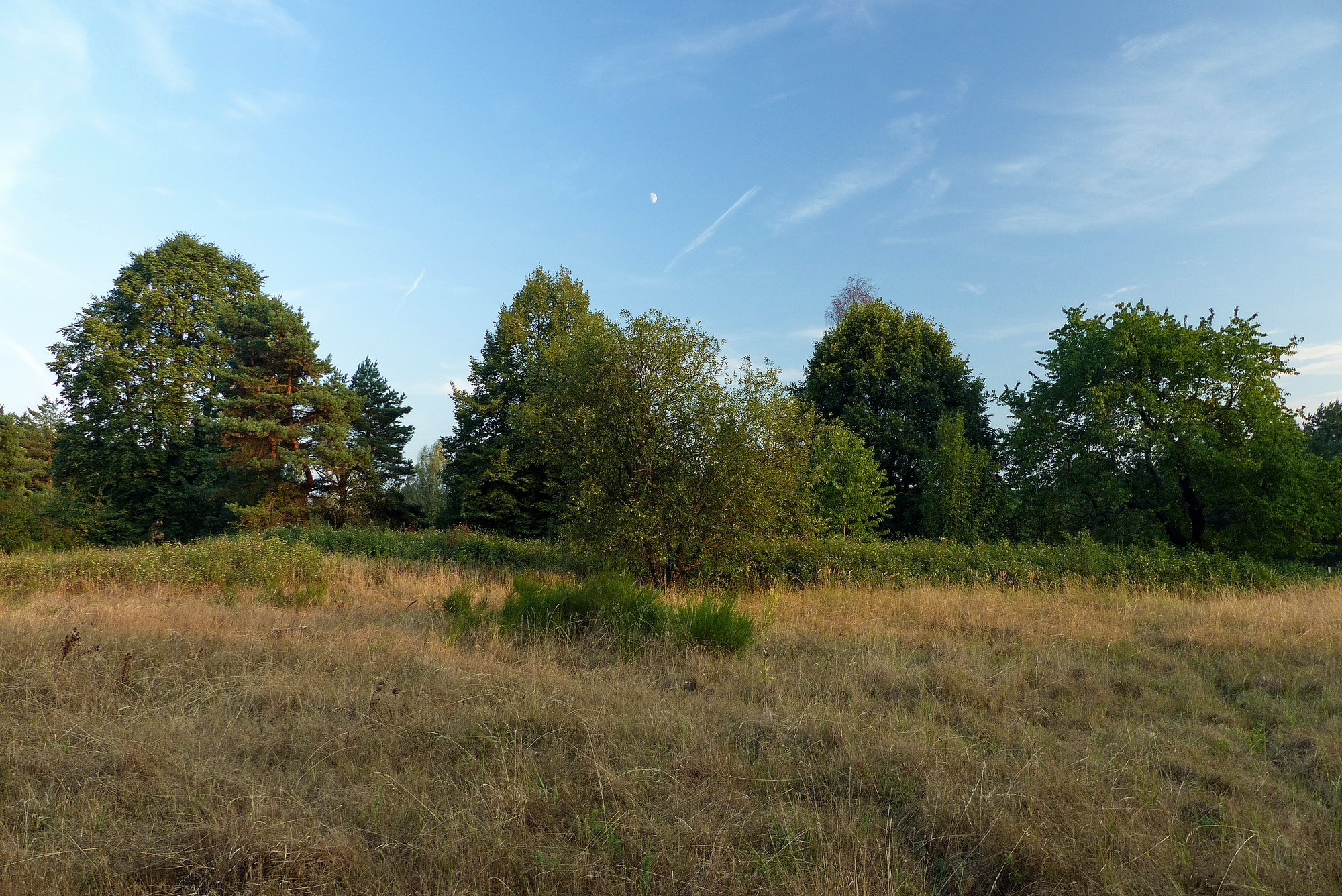 Bývalá Prosíčka – náves